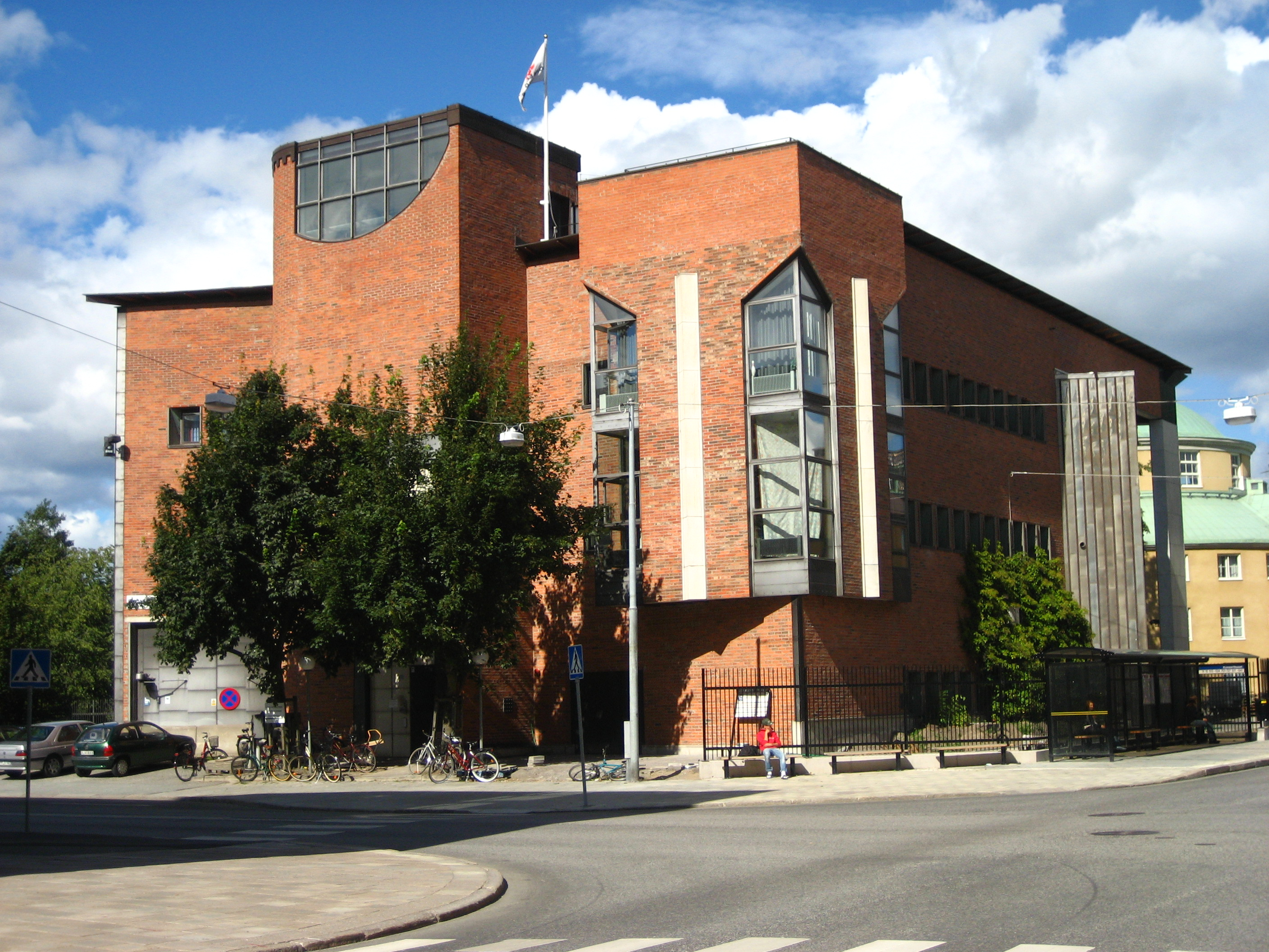 Riksbanken, Örebro, Sweden